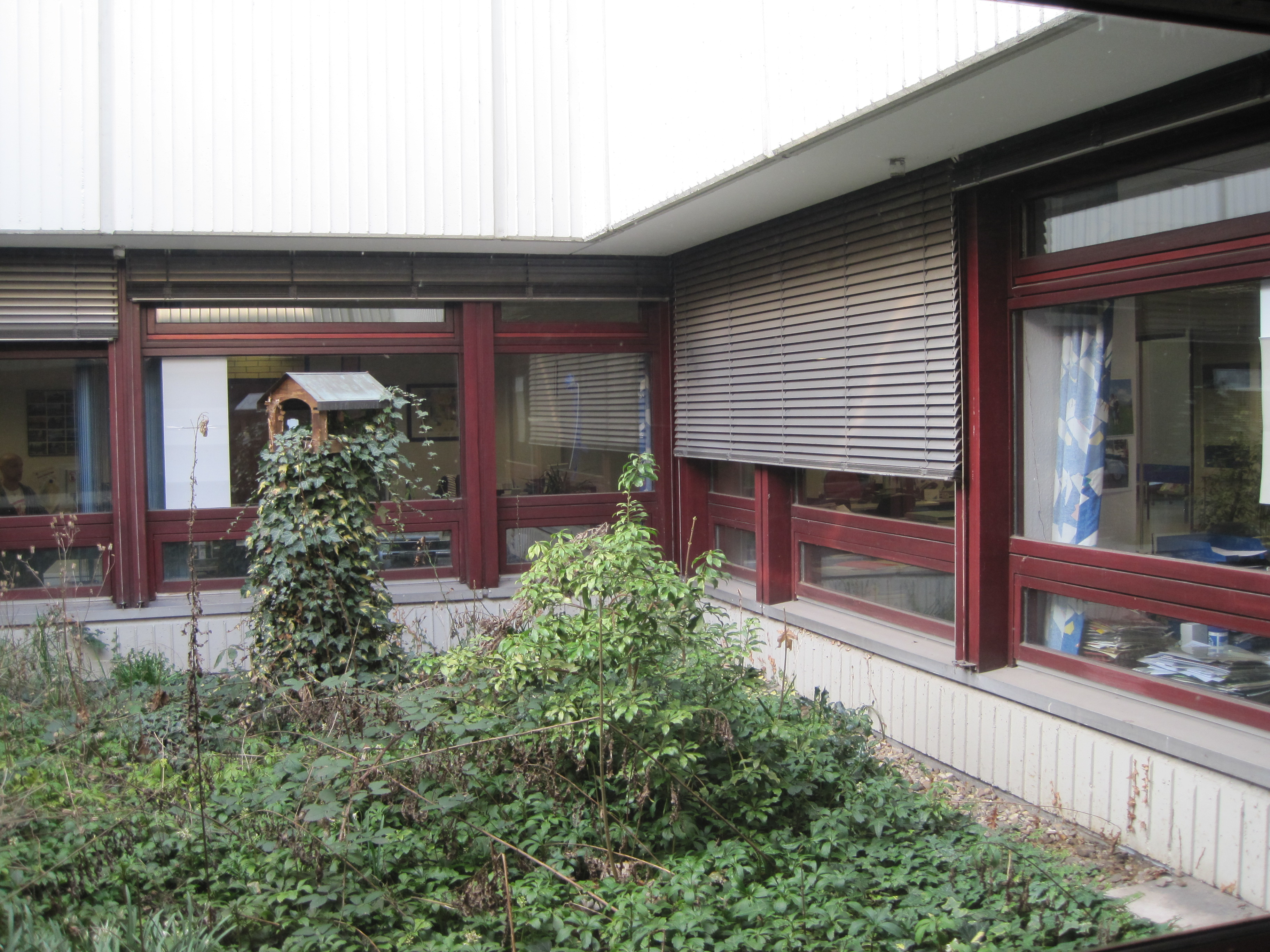 Das Foto zeigt den Innenhof des Rathauses Bockum-Höve.